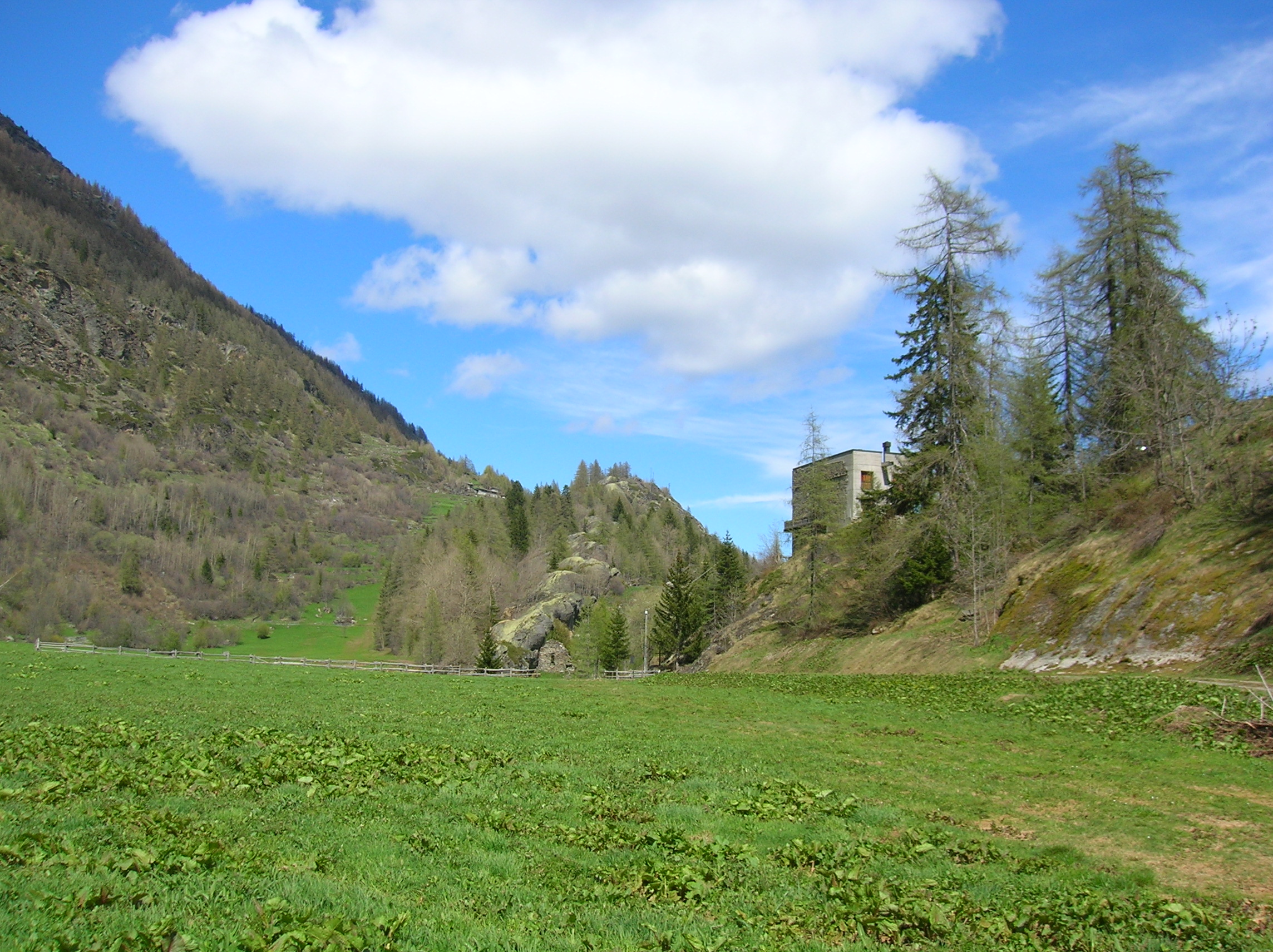 Casaforte di Planaval, Planaval, Arvier, Valle d'Aosta, Italia.